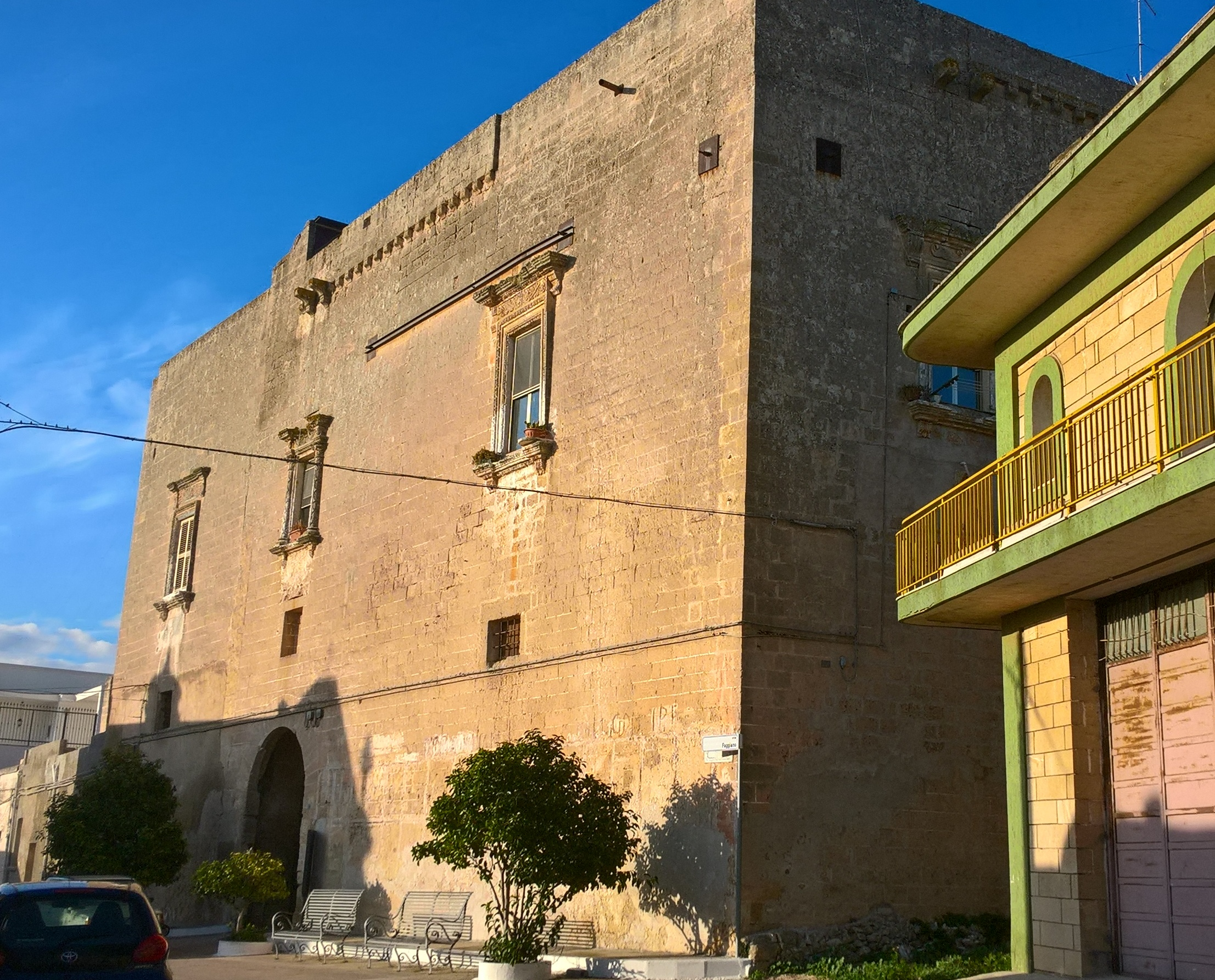 Castello in San Crispieri